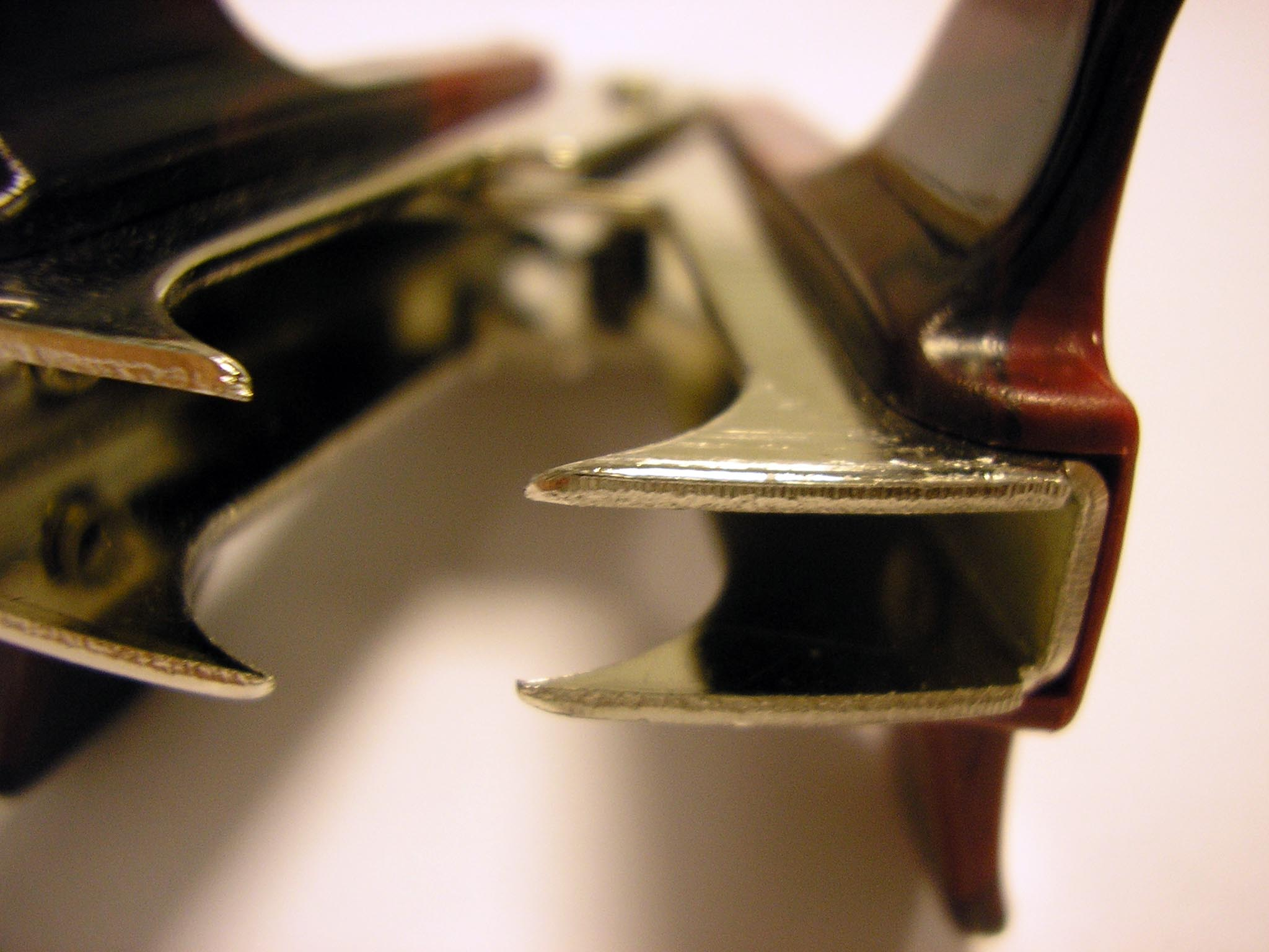 Staple remover